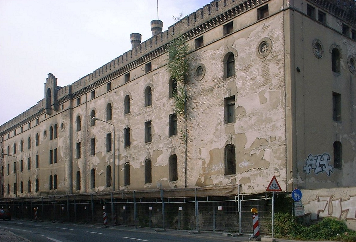 Körnermagazin auf dem Gelände des Proviantamtes in Potsdam (nach einem Entwurf des Militär-Bau-Inspektors F. W. Boelcke unter Einbeziehung der Pläne von Ludwig Persius). Das Gelände soll in den nächsten Jahren saniert werden unter dem Motto als Wissenschaftspark.